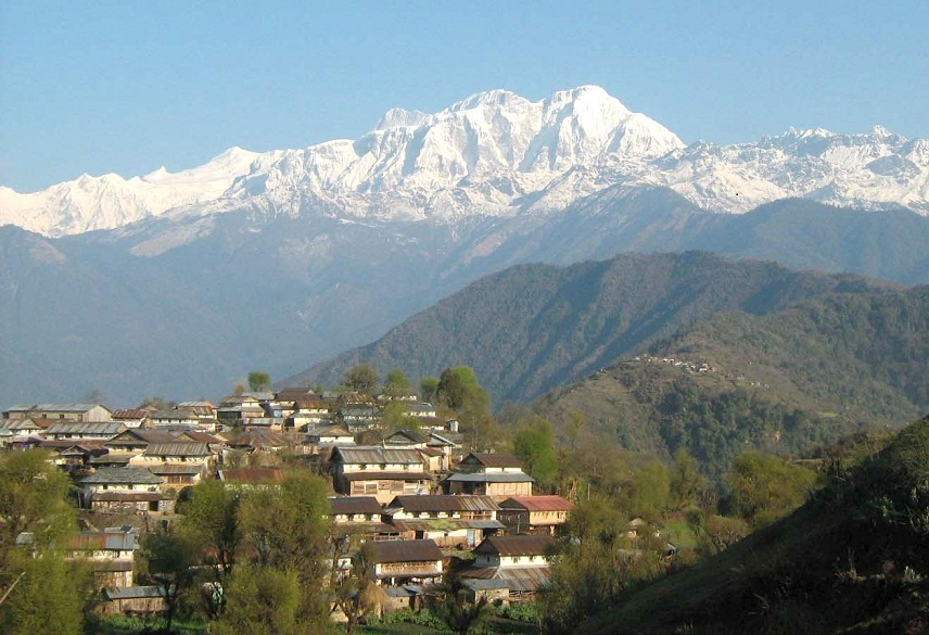 नेपाली: लमजुङको